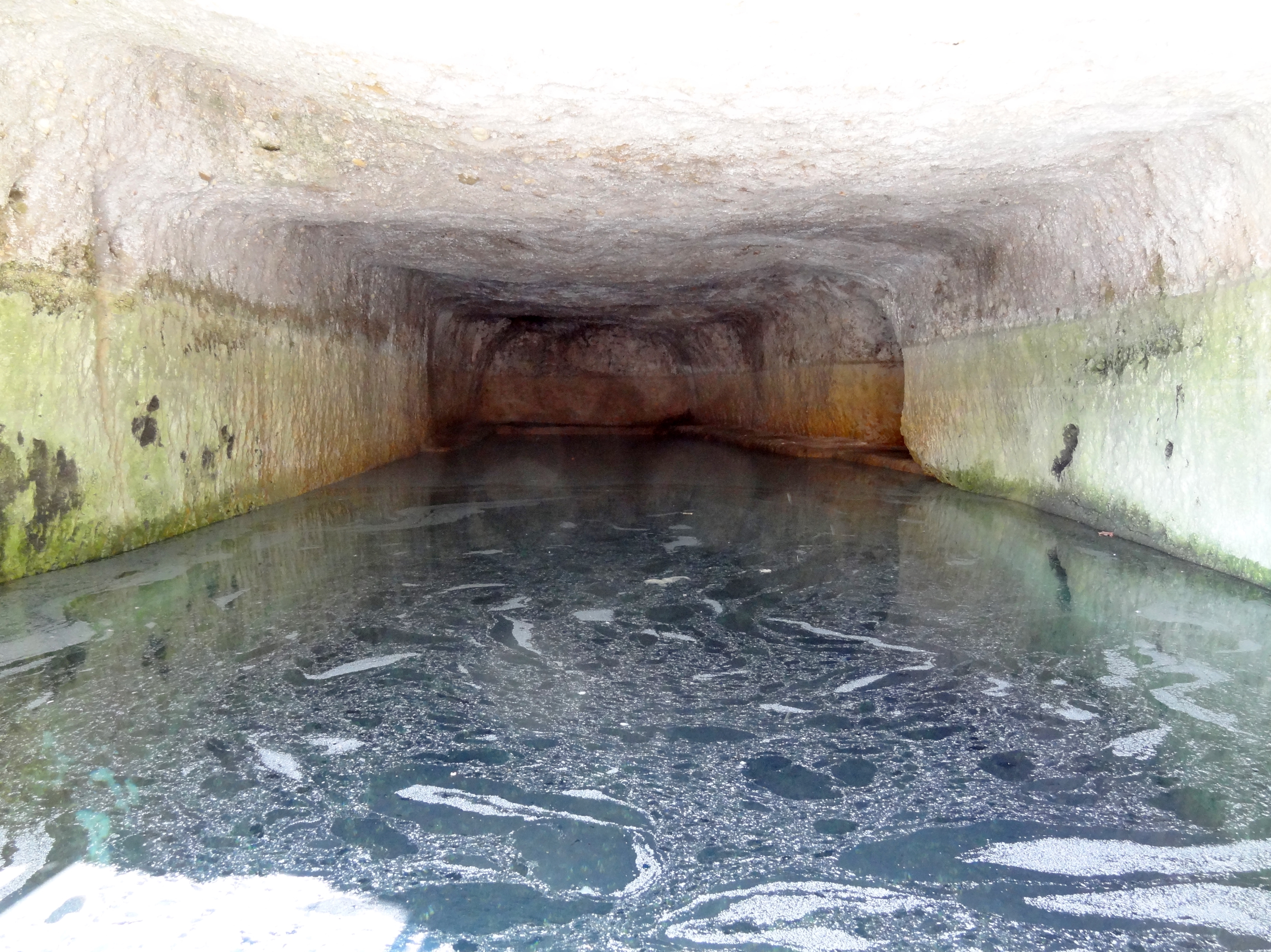 Zisterne des antiken Polyrrhenia (Πολυρρηνία), Gemeinde Kissamos, Regionalbezirk Chania, Kreta, Griechenland